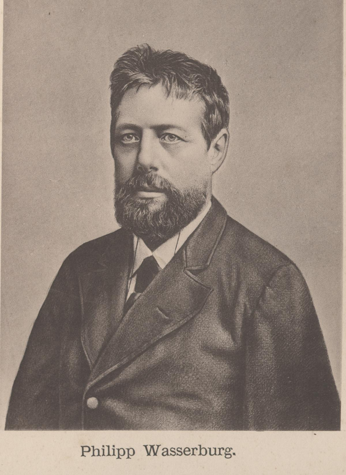 Philipp Wasserburg, Zentrumspolitiker und kath. Publizist/Autor, Mainz